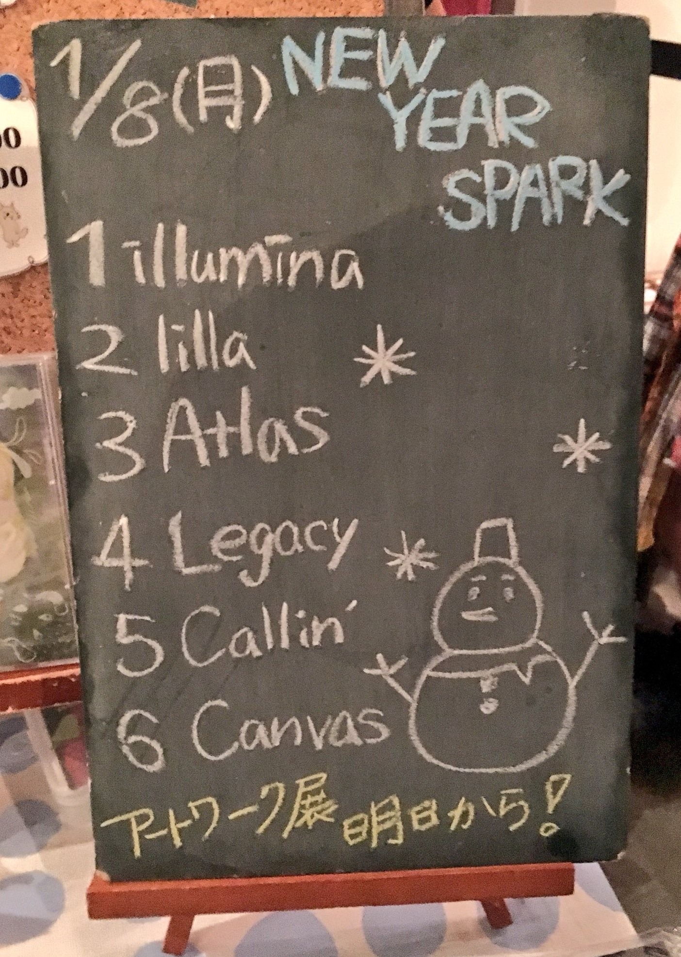 amiinAセトリボード(20180108(1))